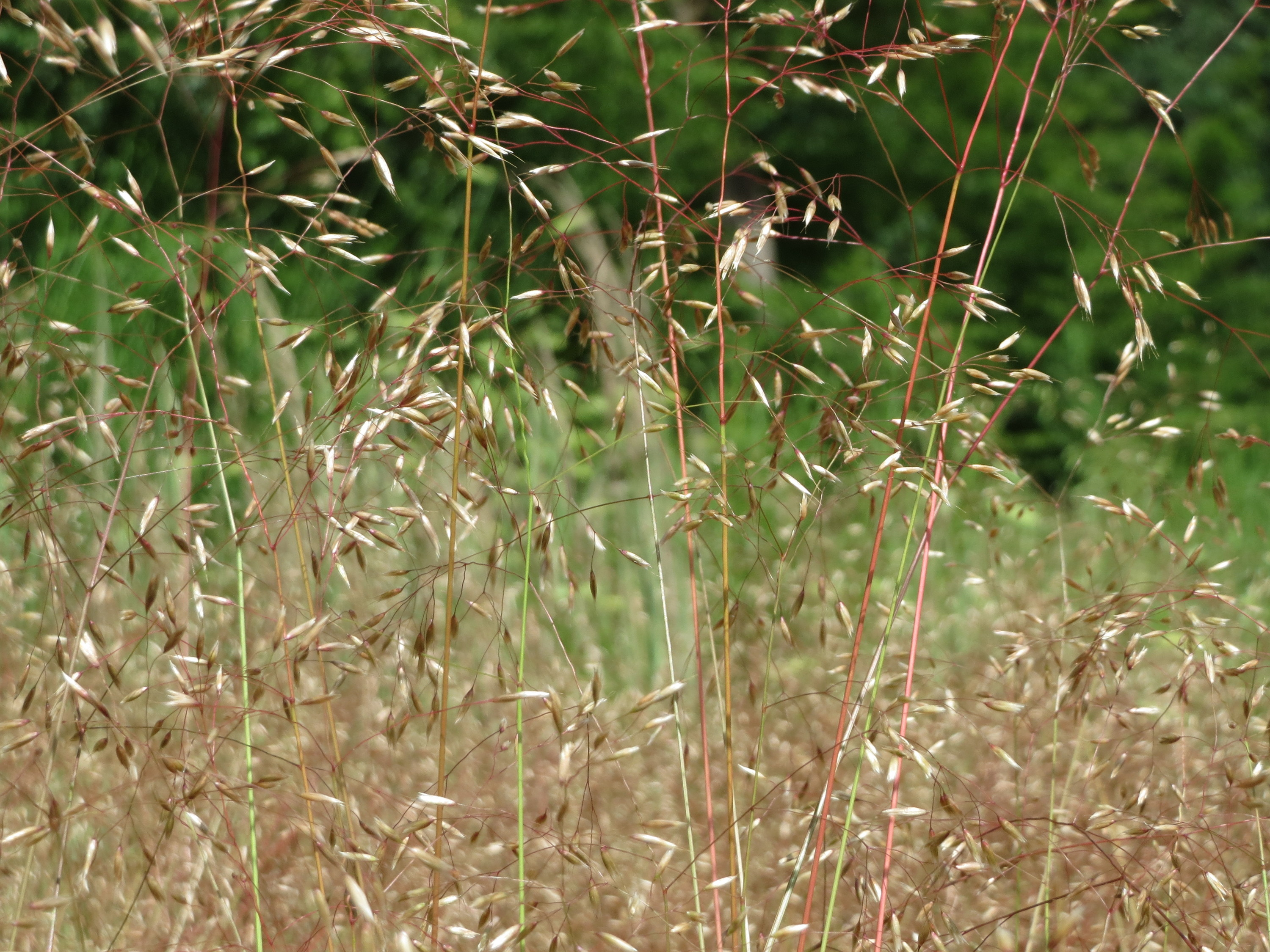 Draht-Schmiele (Avenella flexuosa) im Schwetzinger Hardt